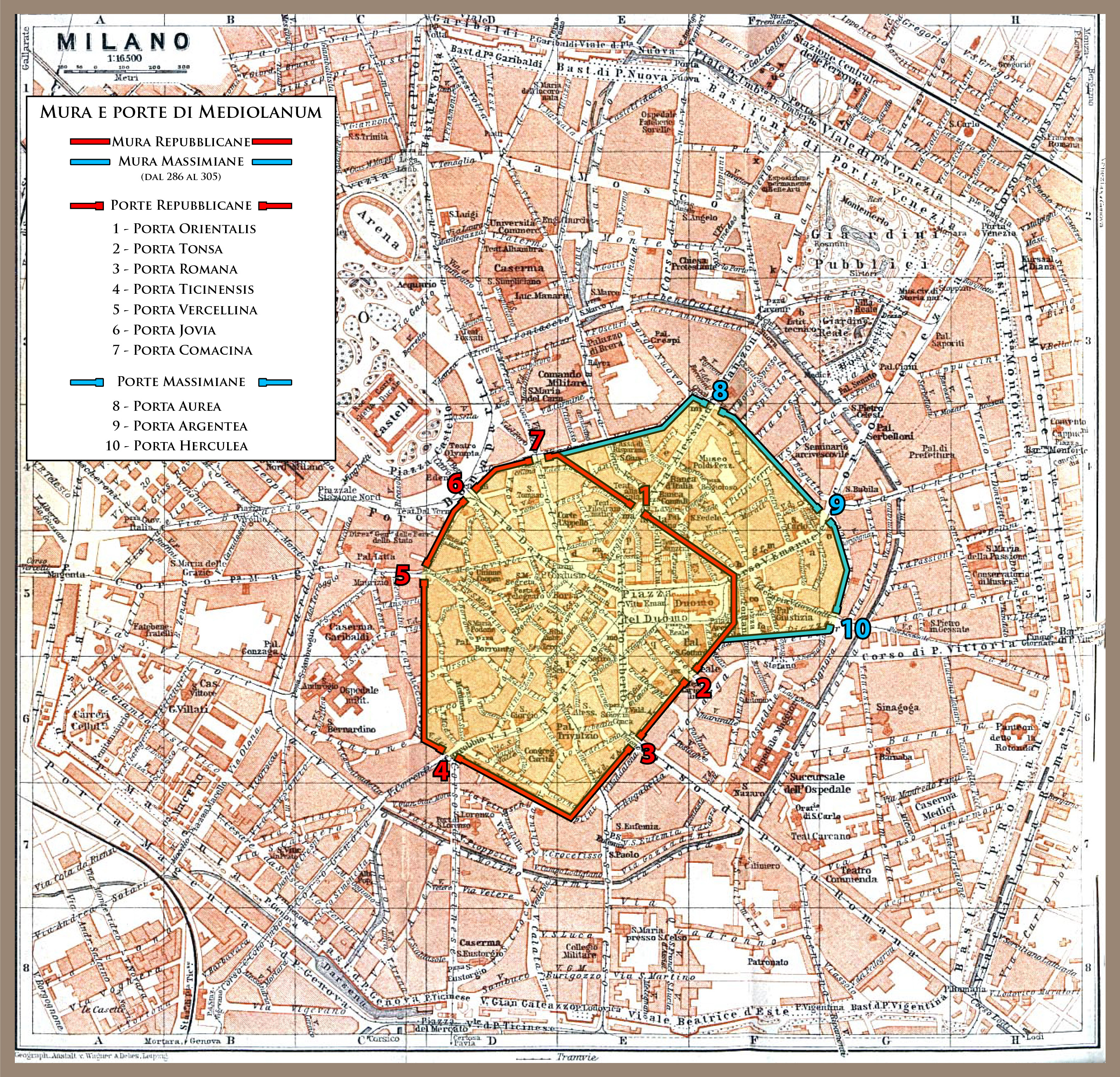 Mappa di Milano con la muraglia evidenziata